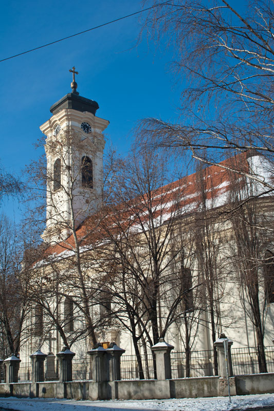 Алмашка црква у Новом Саду се налази у истоименој, Алмашкој улици.